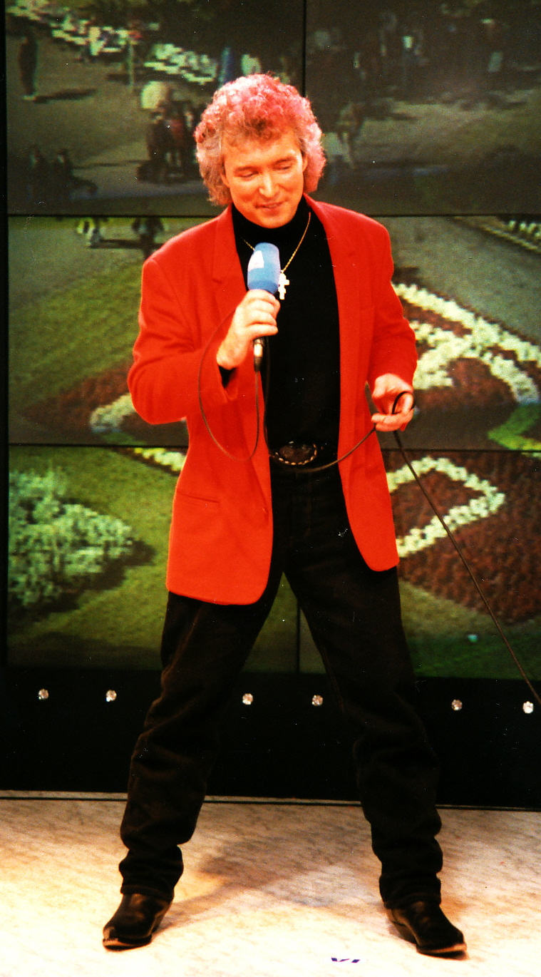 Peter Orloff auf der Funkausstellung